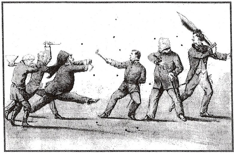 Рисунок из анонимного альбома 1850-х годов с изображением членов окружения орловского губернатора Сафоновича